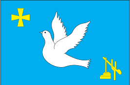 Прапор Саратського району